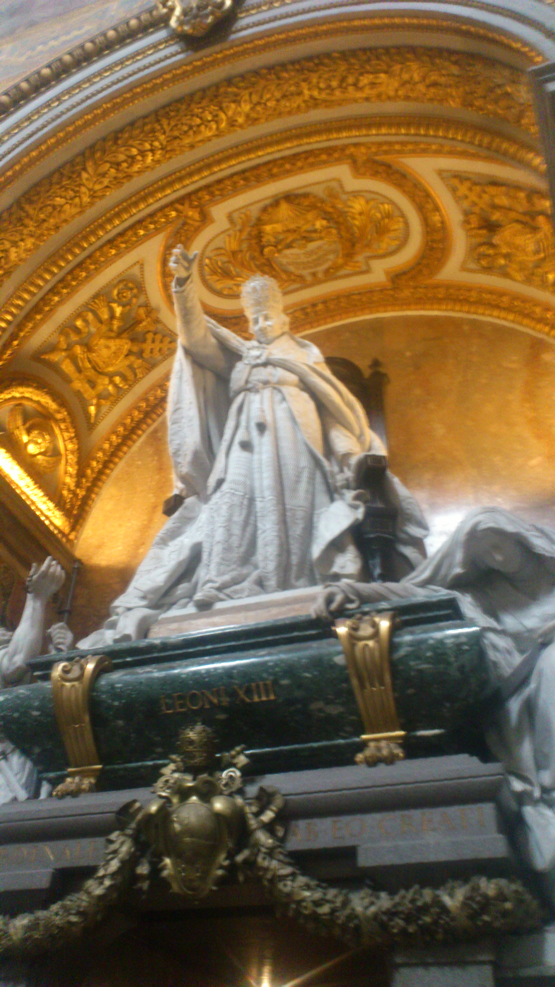 Le Pape Léon XIII à la basilique saint Jean de Latran à Rome en Italie